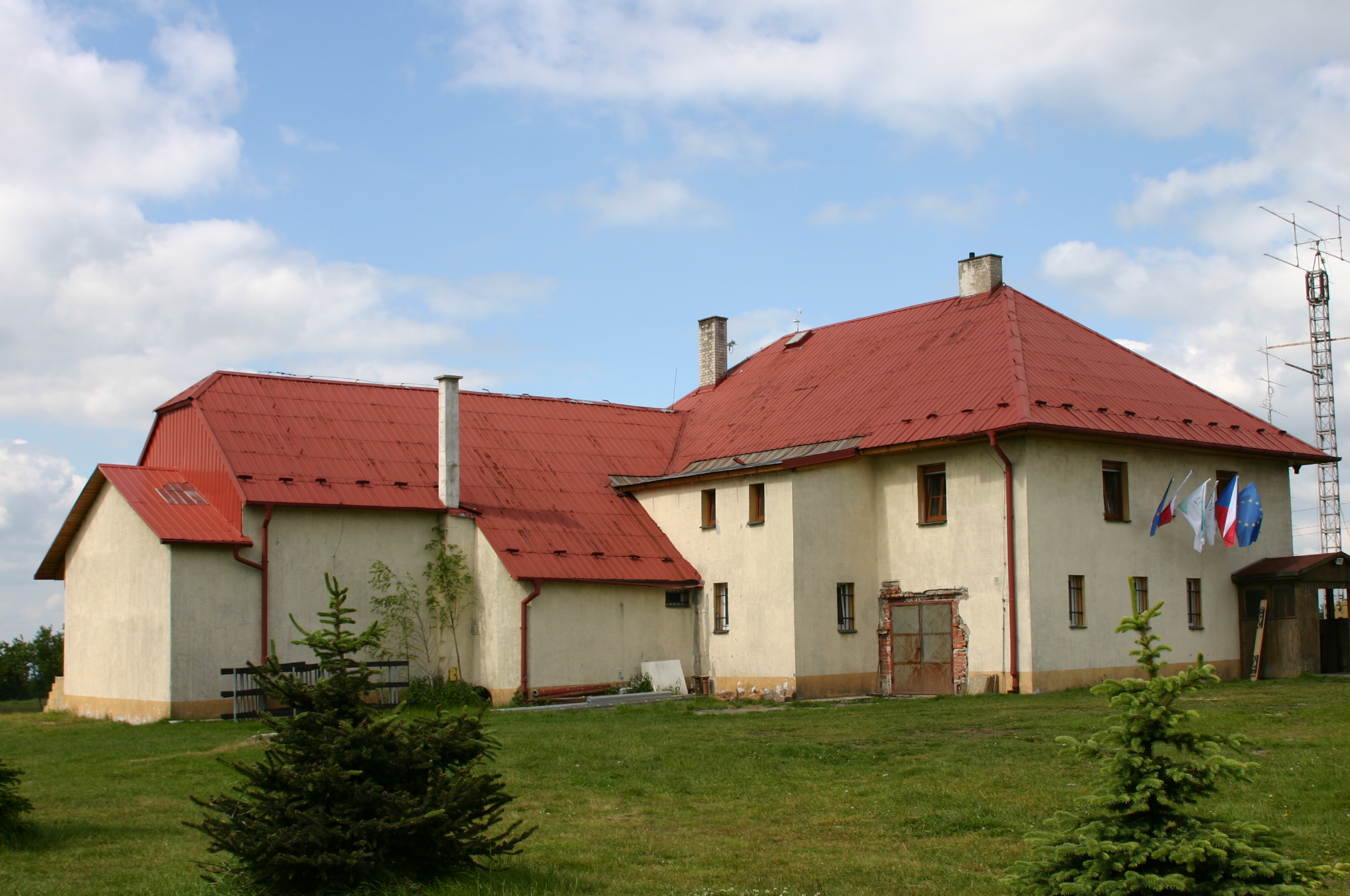 Výukové středisko České zemědělské univerzity Praha v Lesné (Nová Ves v Horách)